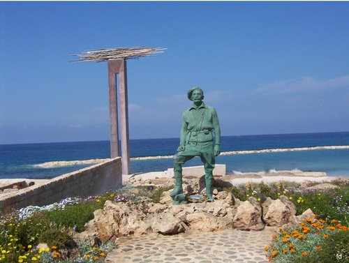 Monument Georgius Grivas Freiheitskämpfer